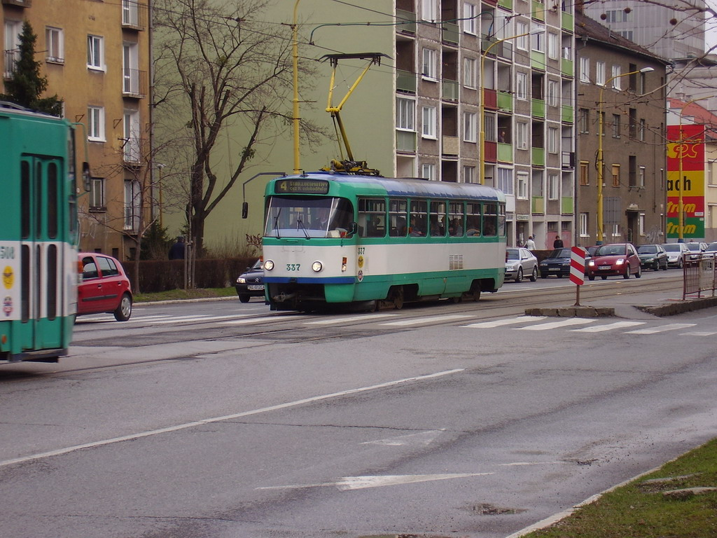 Modernizovaná košická tramvaj T3 s původní elektrickou výzbrojí.